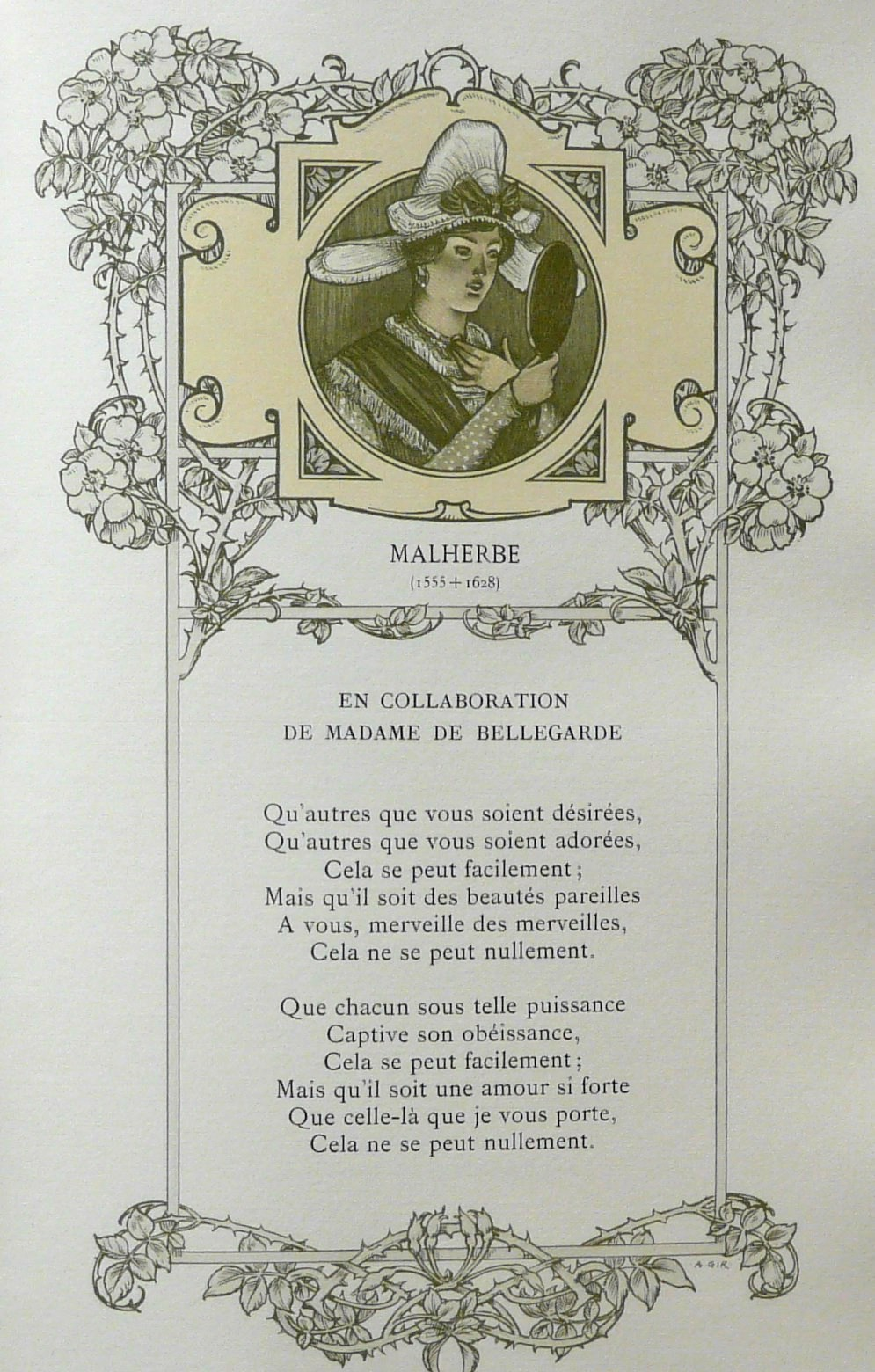 Illustration d'Adolphe Giraldon pour Le Chansonnier Normand, publié par La Société Normande du Livre Illustré, 1905